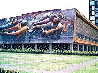 UNAM, Torre de Rectoría, muro sur con el mural de David Alfaro Siqueiros "El pueblo a la universidad, la universidad al pueblo. Por una cultura nacional neohumanista de profundidad universal", (1952 - 1956).